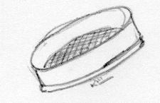 Tamis, sas, matériel de cuisine